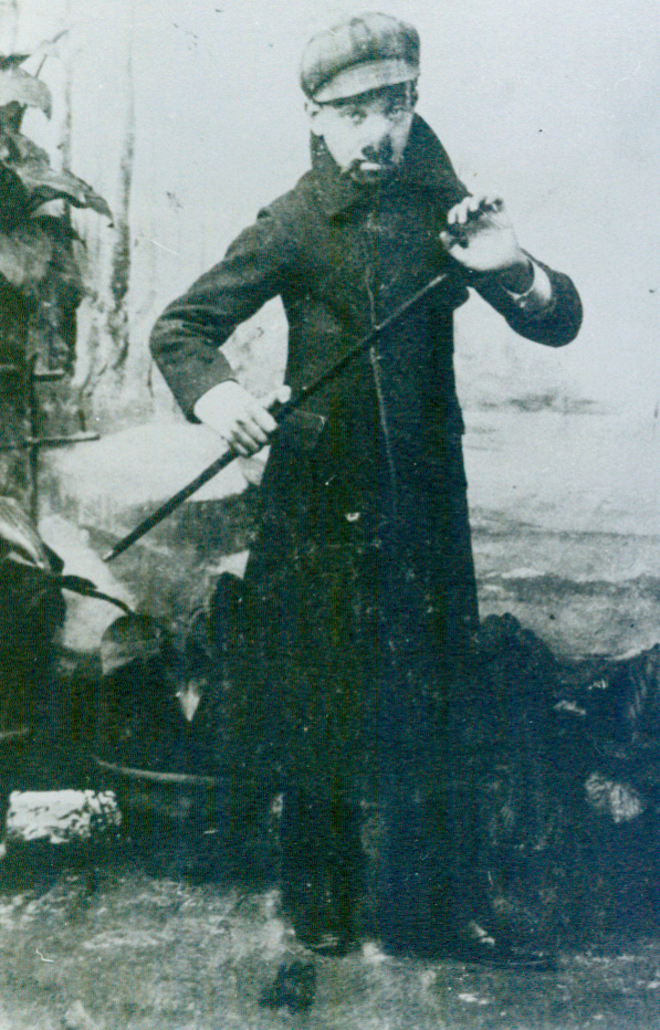 foto del giovanissimo Raffaele Viviano in una macchietta del 1903